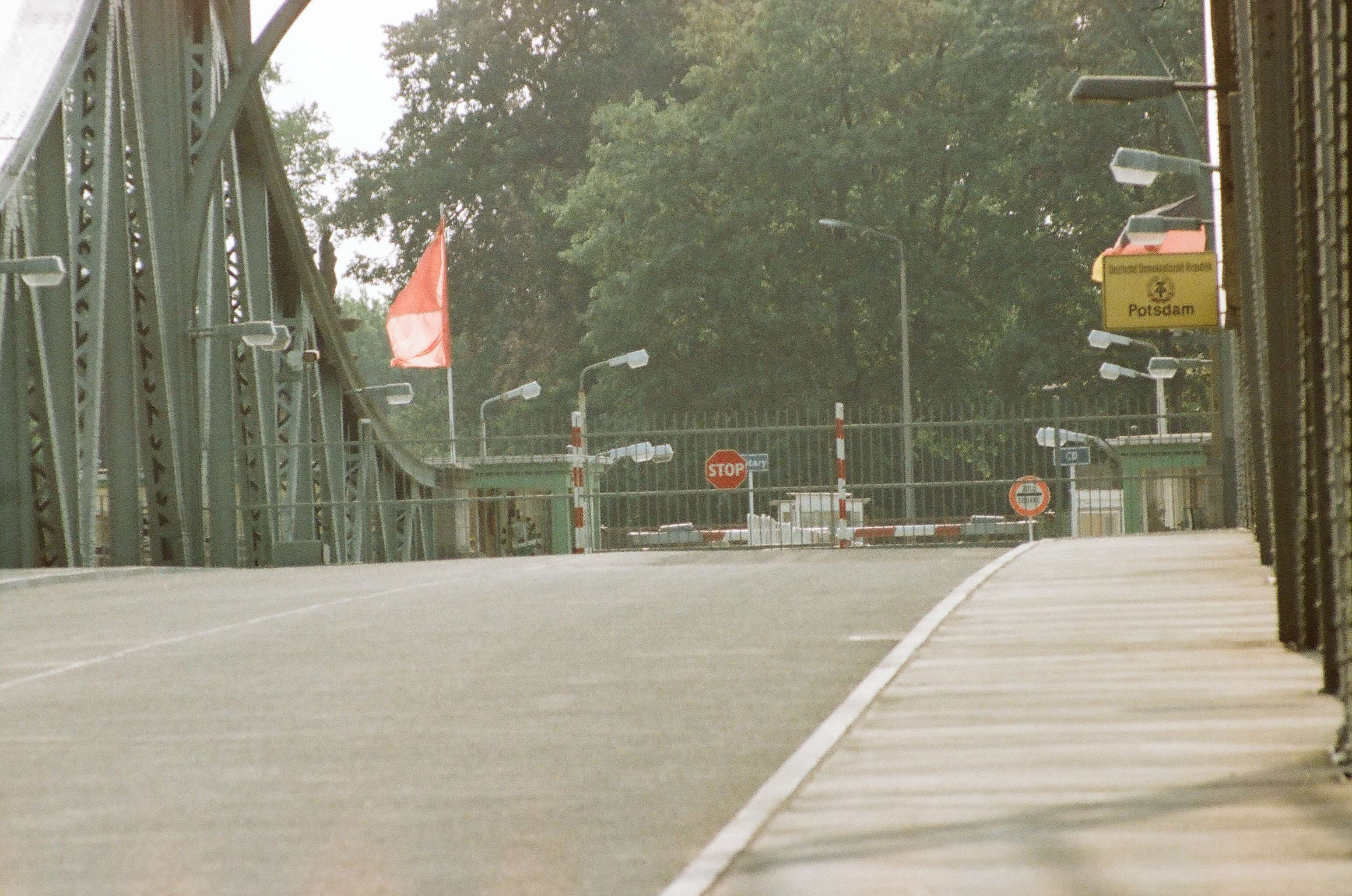 Grenzübergang Glienicker Brücke